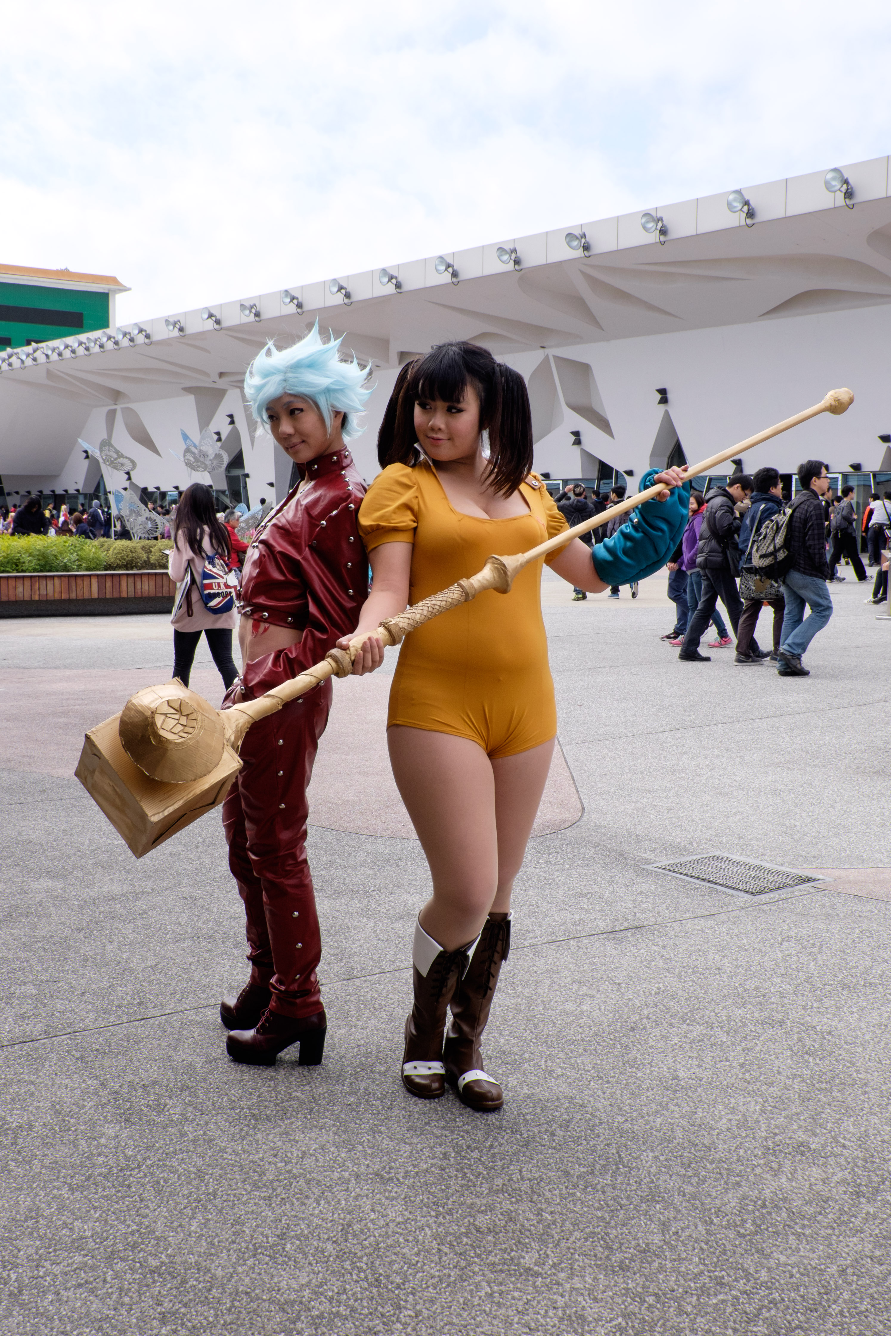 FF25第二日上午，＜七つの大罪＞バン（左）與ディアンヌ（右）Cosplayers。